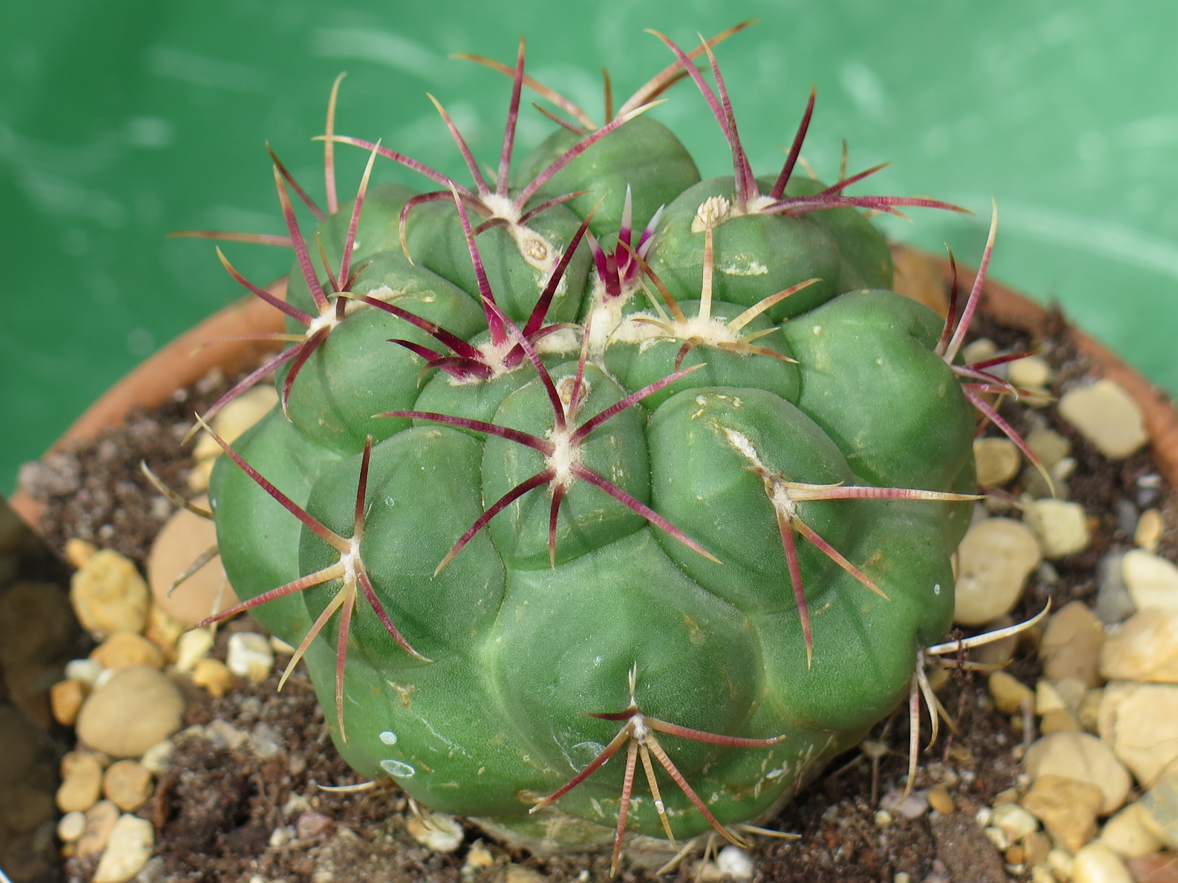 Thelocactus hexaedrophorus